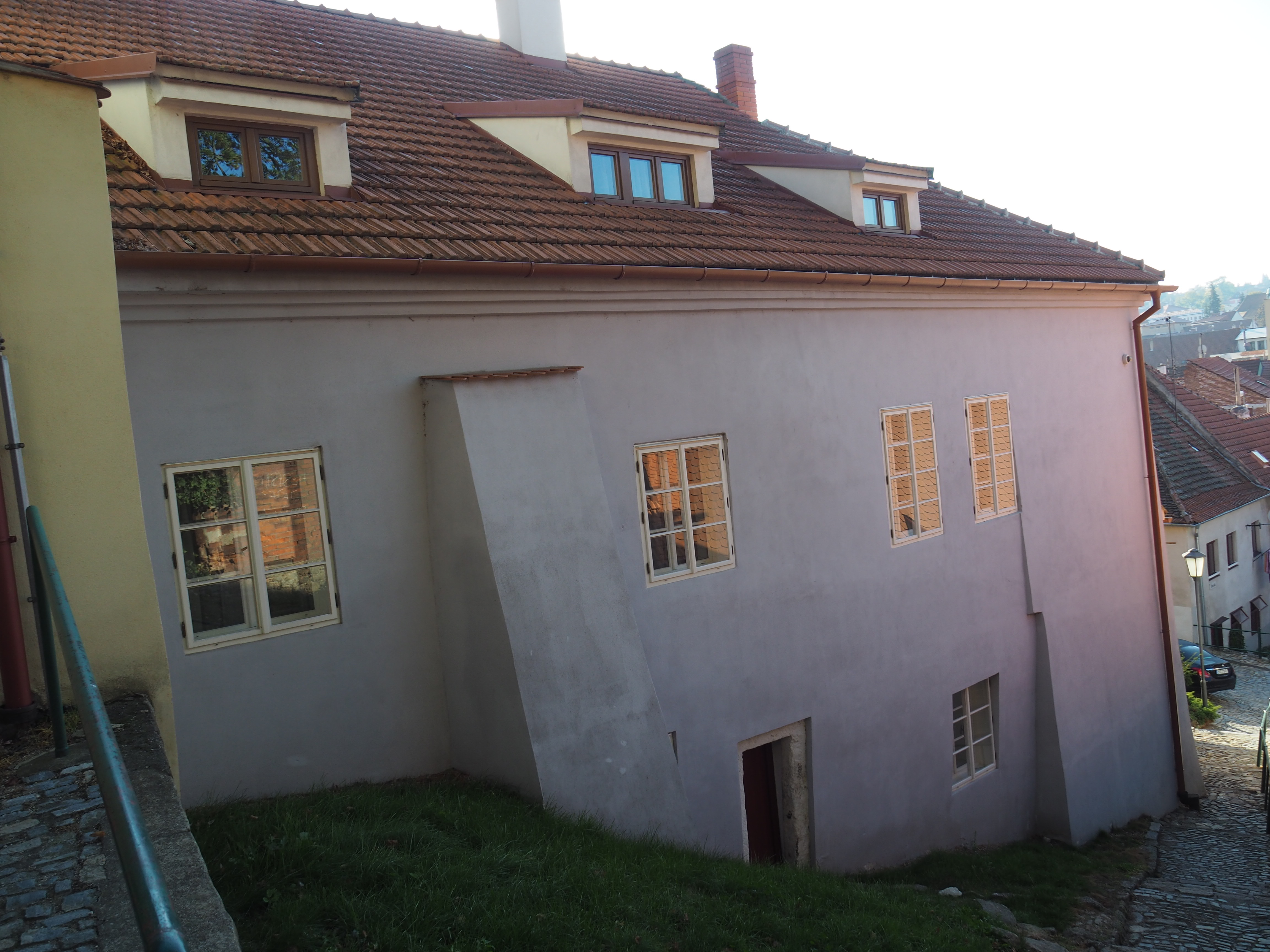 židovský Chudobinec v Třebíči